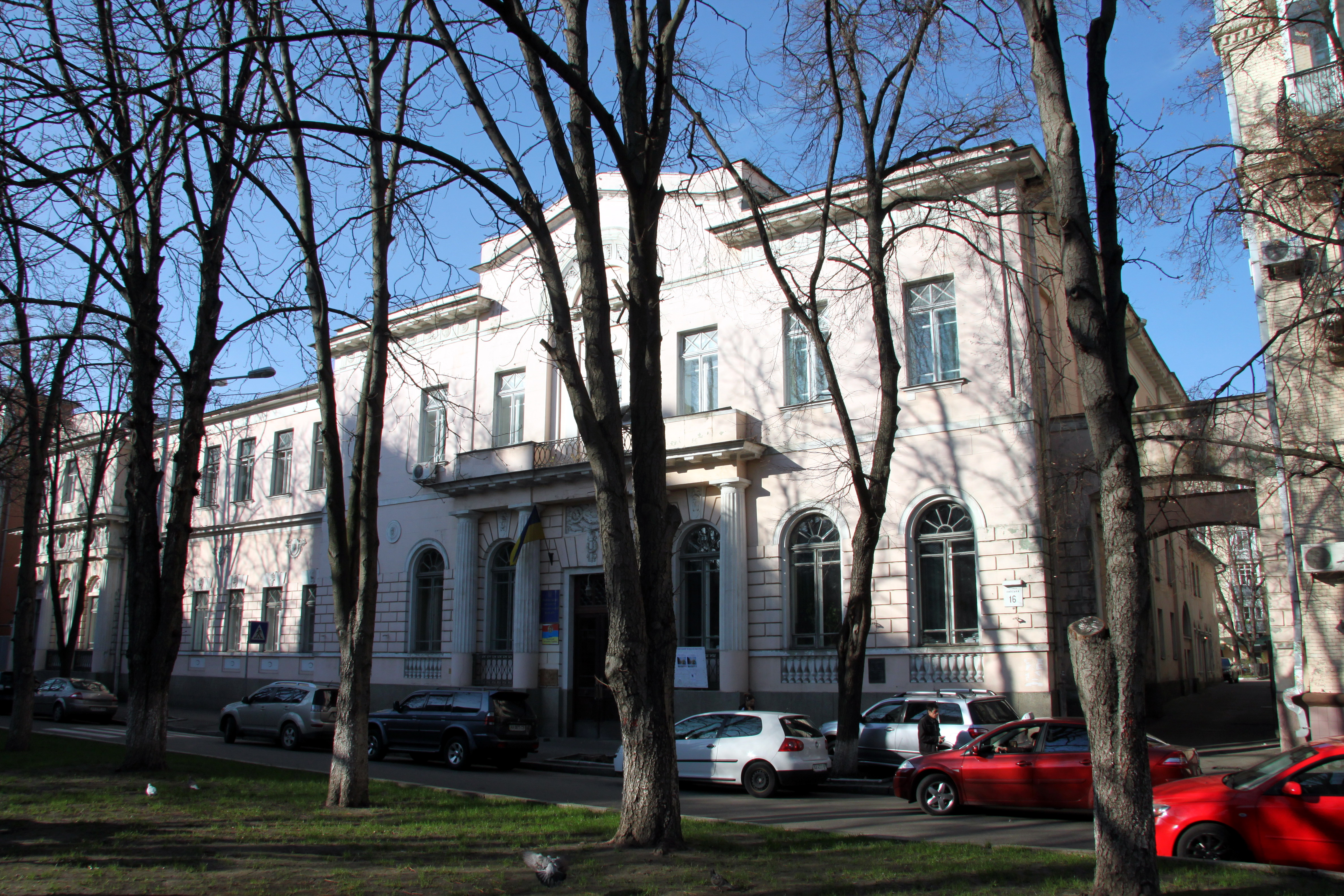 Садиба міська, Липська вул., 16, Київ